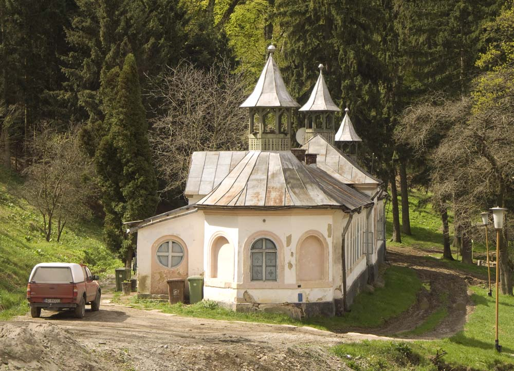 Corpul de clădire al vechilor chilii. Adevărată bijuterie arhitecturală, ridicată la o scară care nu striveşte ansamblul şi se integrează mediului ambiant.